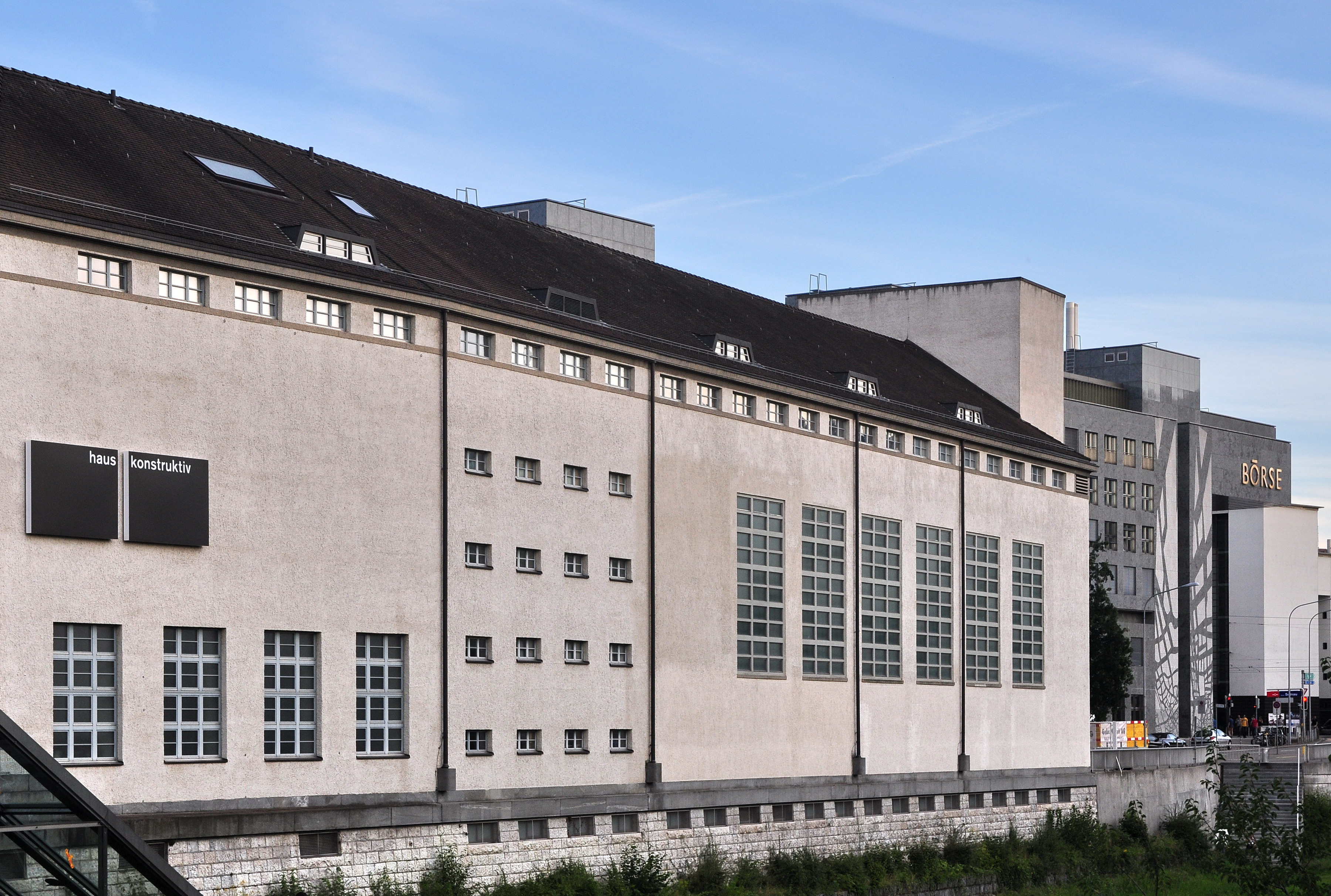 Börse Zürich - EWZ Unterwerk Selnau - Haus Konstruktiv in Zürich-Enge (Switzerland)